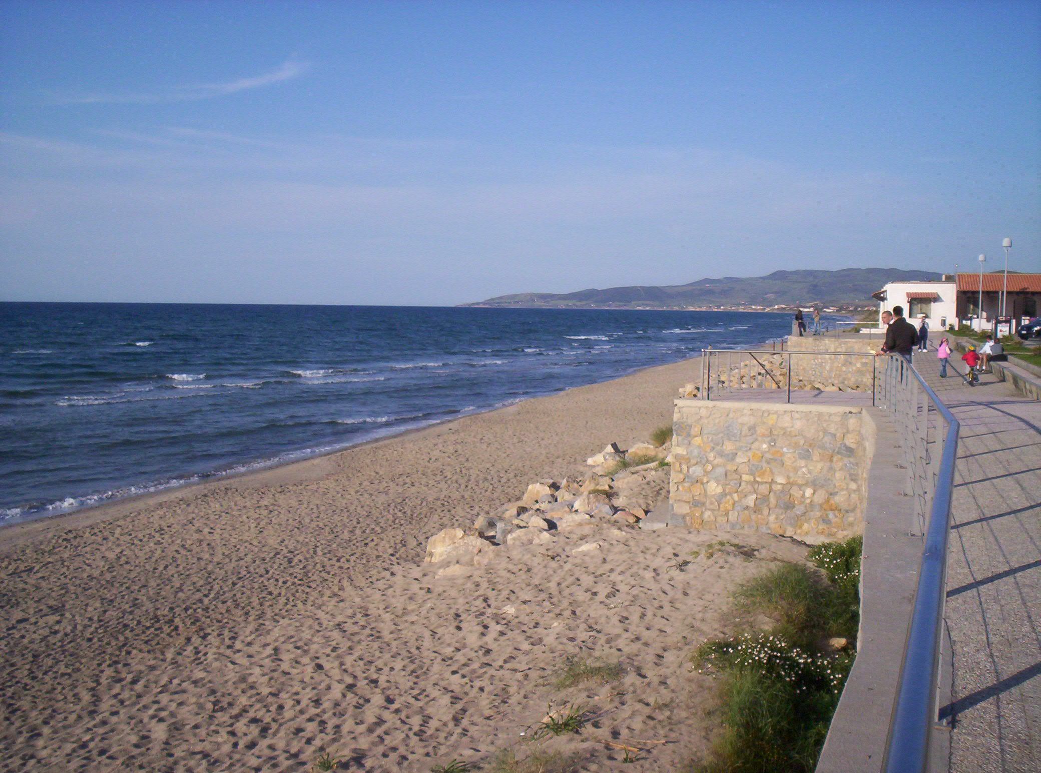 Parte del litorale di Sorso.